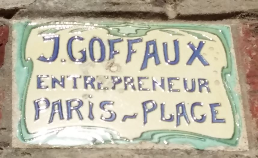 Plaque de J. Goffaux au 42, rue Saint-Jean au Touquet-Paris-Plage